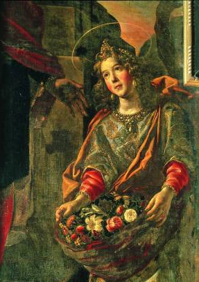 Santa Casilda (fragmento), Catedral de Burgos.